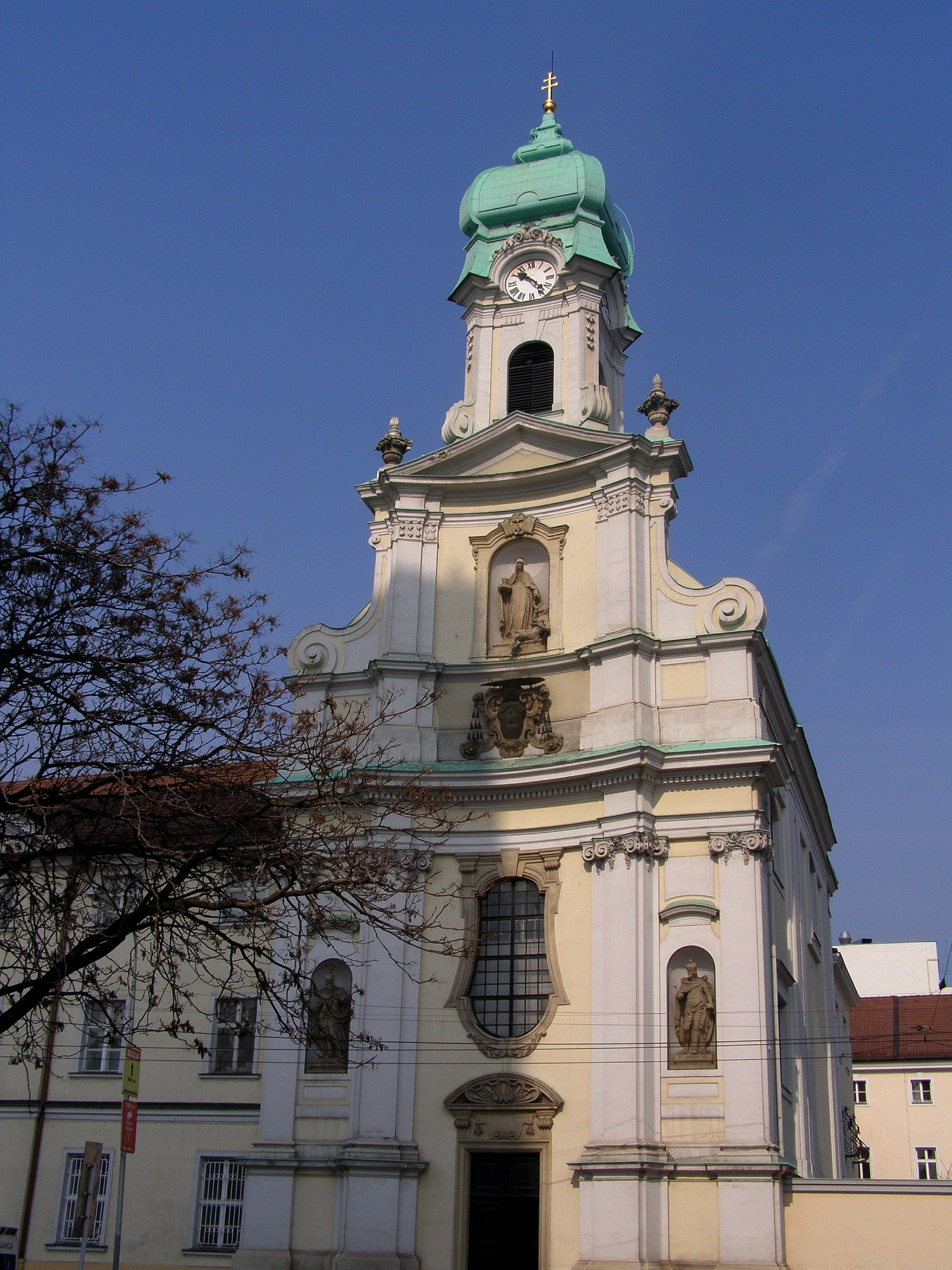 Priečelie kostola svätej Alžbety v Bratislave Object location48° 08′ 46.68″ N, 17° 06′ 50.4″ E